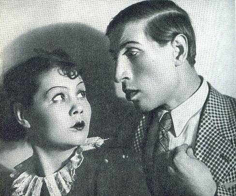 Сергей Филиппов в роли члена месткома Родионова в спектакле Ленинградского Театра Комедии "Страшный суд"